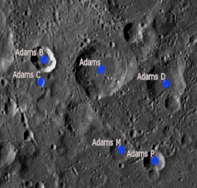 Cráter lunar Adams. Cráteres satélite. (Imagen LRO)